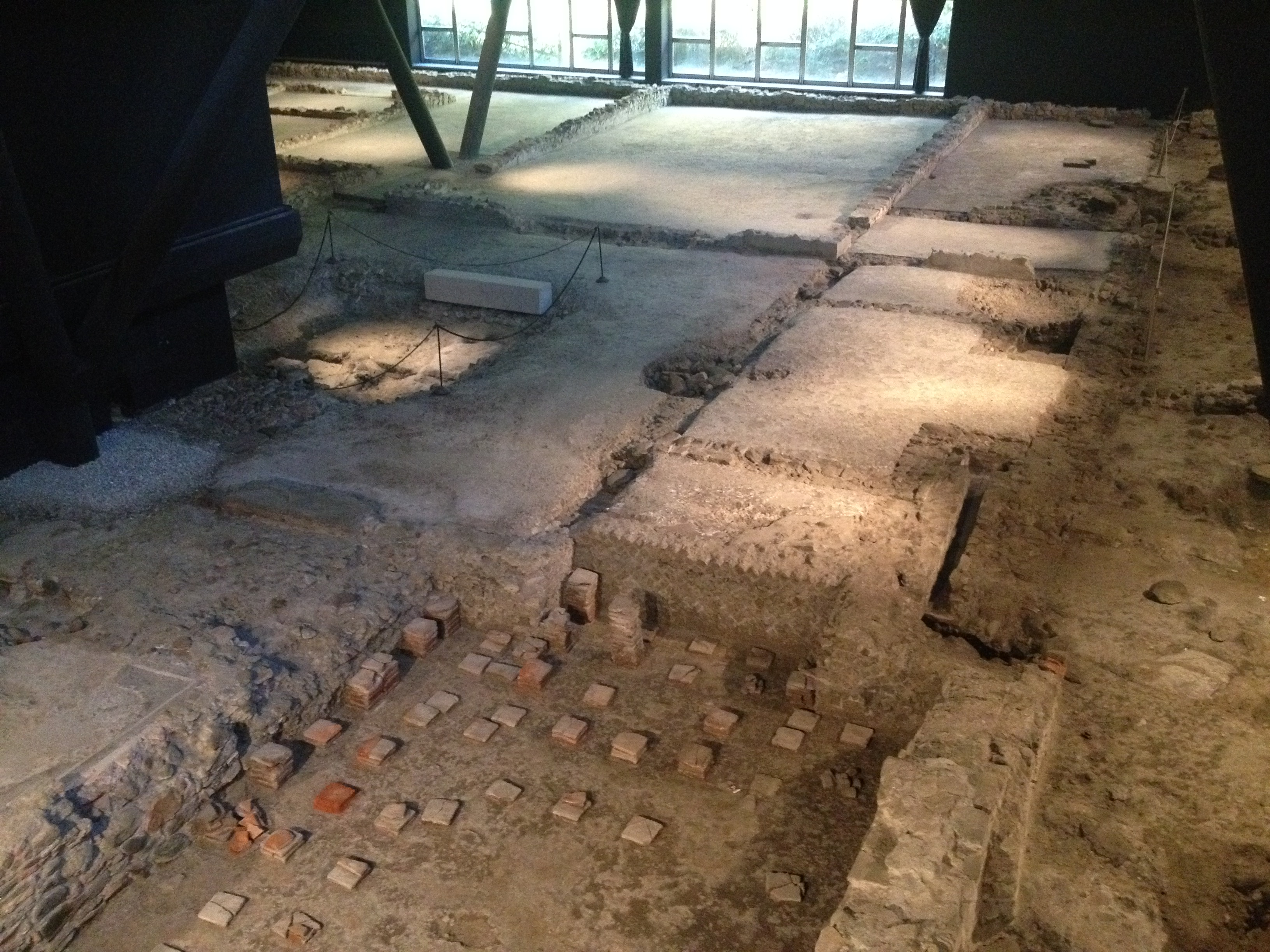 Villa della Consolata, vista da est: in primo piano tepidarium e calidarium, al centro vano absidato e impluvium, in fondo il triclinium This is a photo of a monument which is part of cultural heritage of Italy.